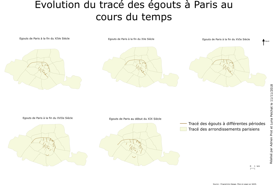 Evolution du tracé des égouts parisiens au cours du temps.